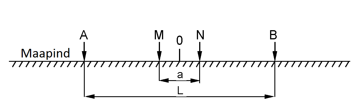 Schlumberger'i elektroodkonfiguratsioon